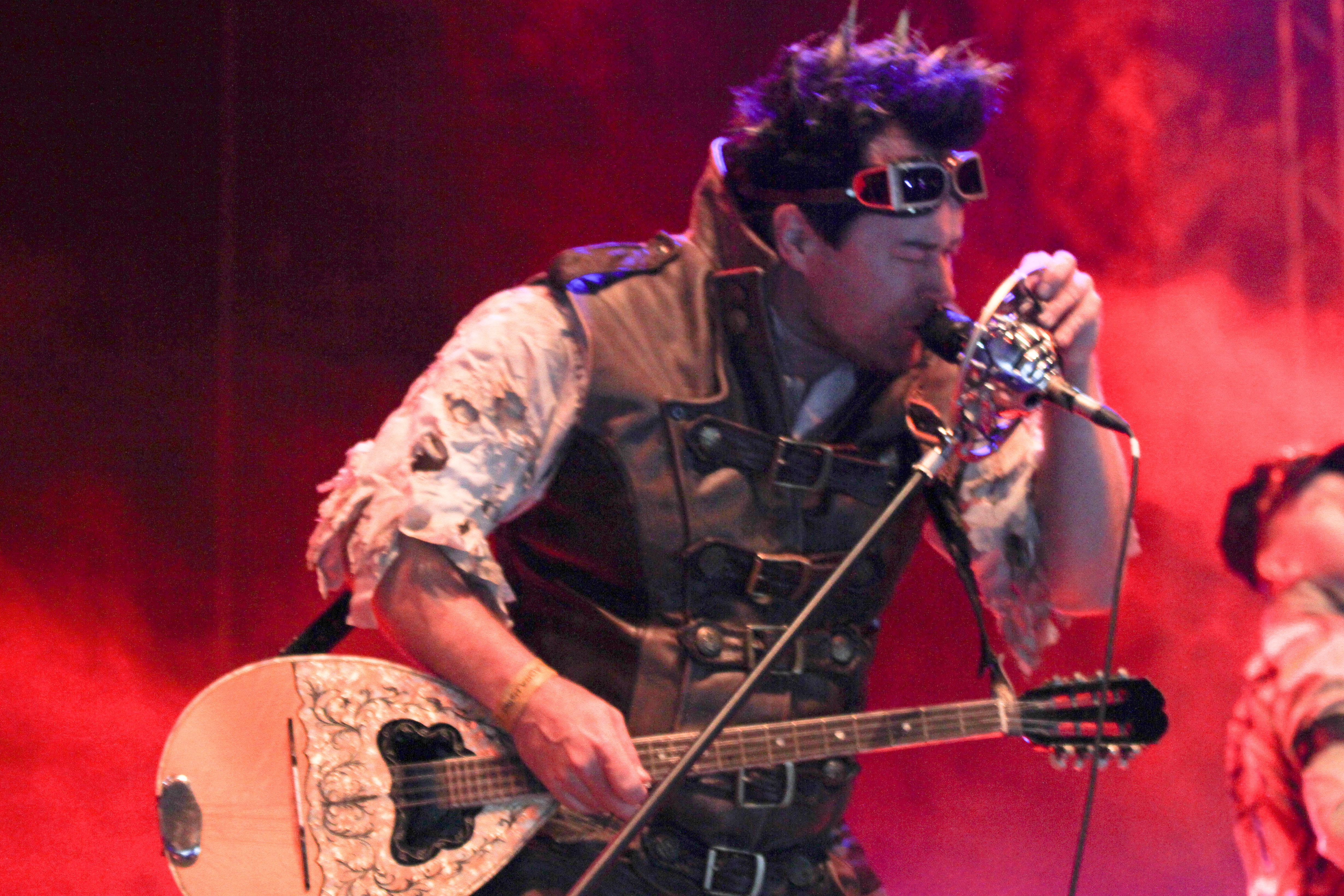 Abney Park auf dem Wave-Gotik-Treffen 2013 in Leipzig, Agra-Halle.